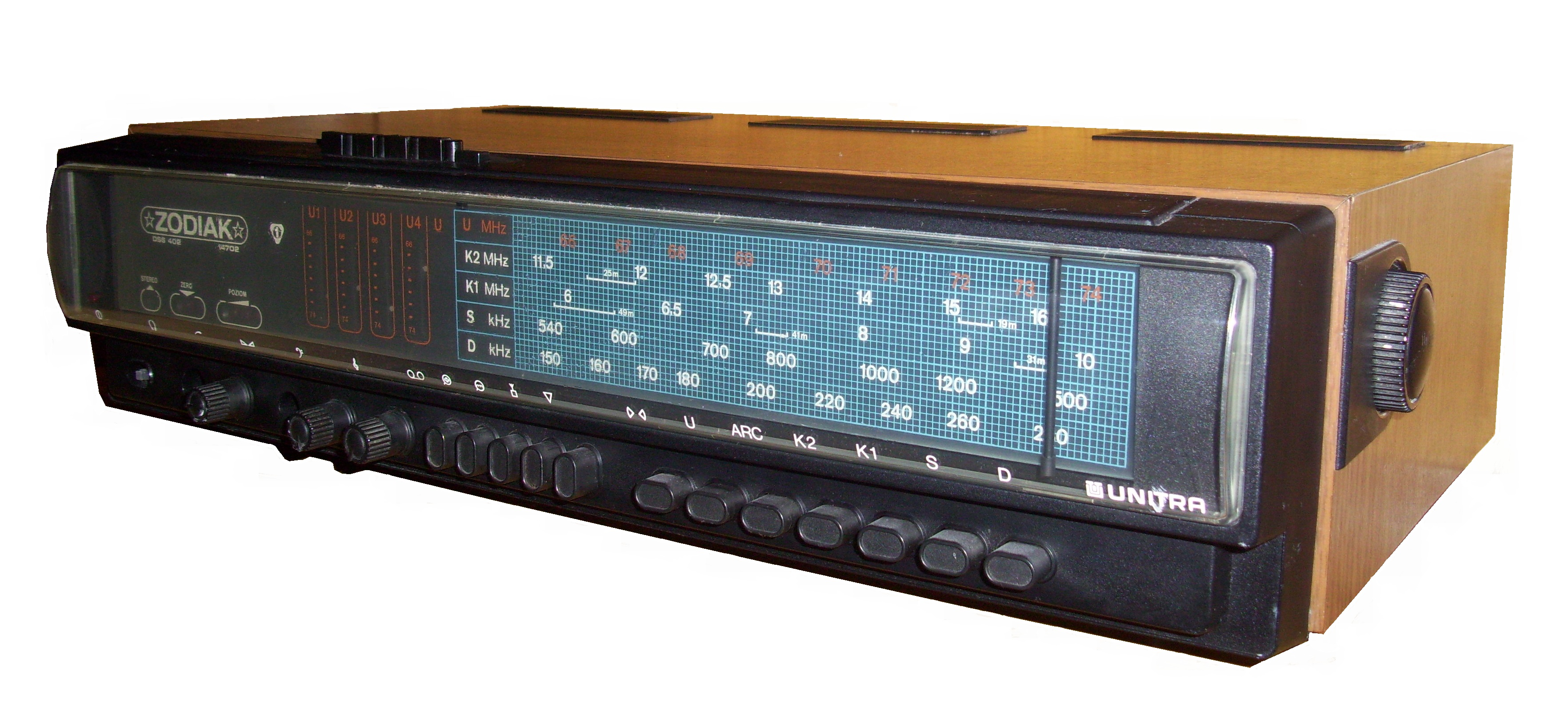 Radio typu Zodiak DSS-402